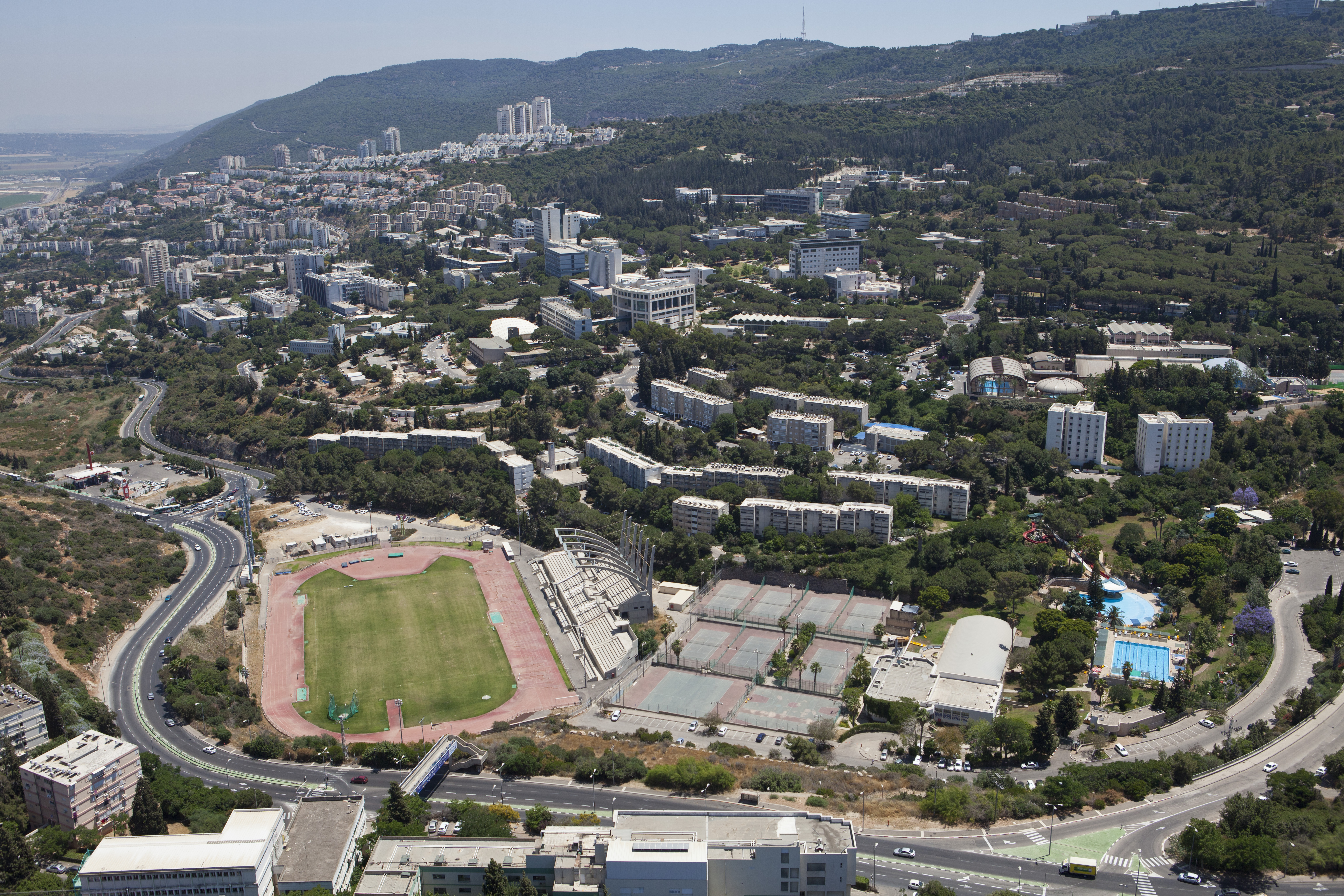 הטכניון